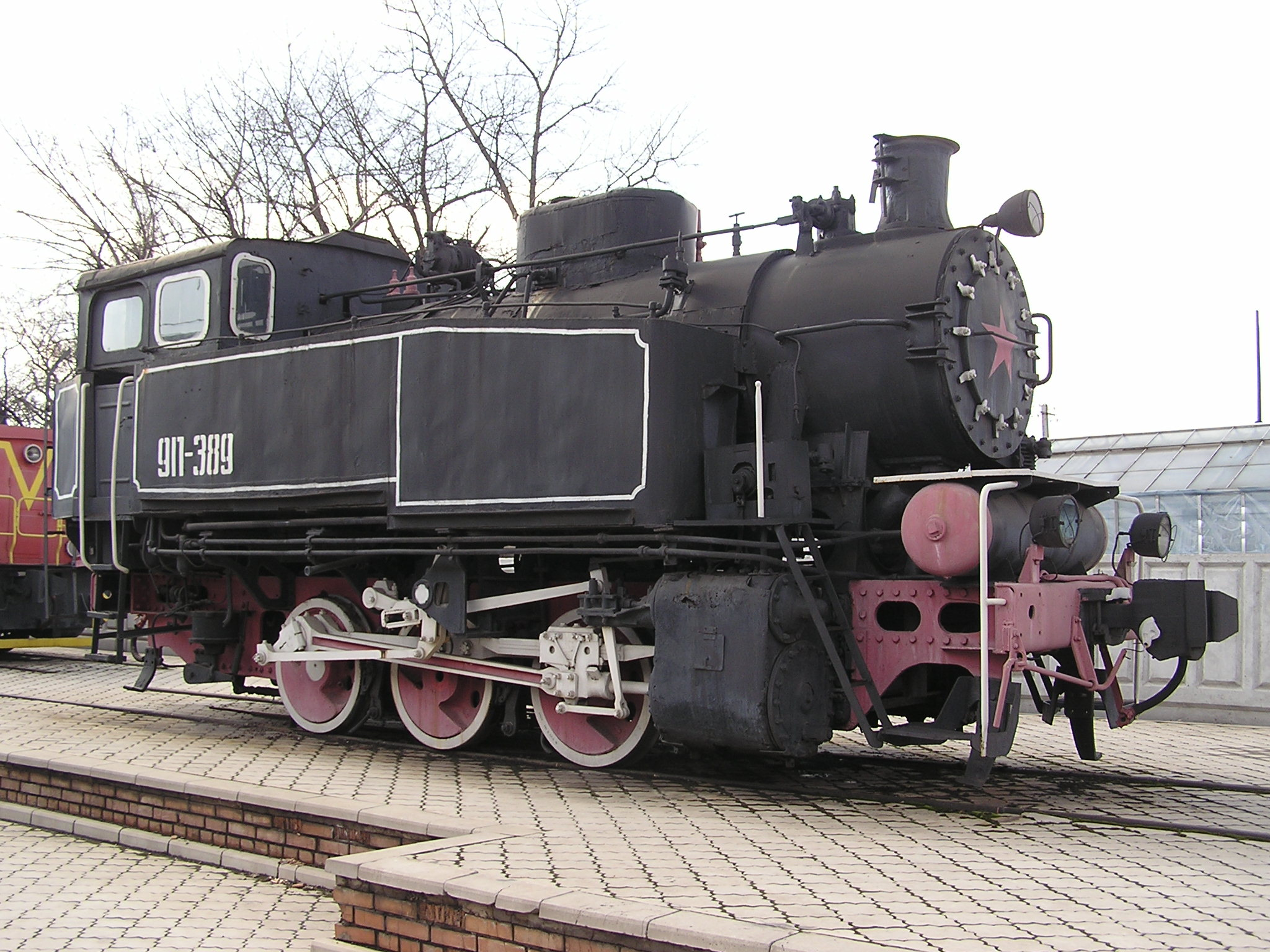 Музей истории и развития Донецкой Железной дороги. Локомотив 9П-389 Steam locomotive 9P(Railway museum in Donetsk(Ukraine))